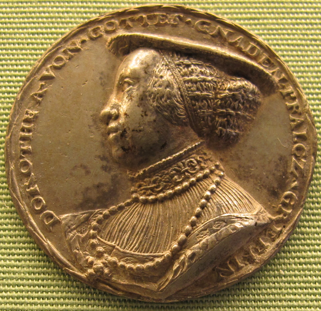 Matthes gebel, dorothea, moglie dell'elettore friedrichs II von der pfalz, 1537